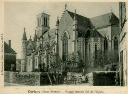 Ceriz Ay Cathedral Gothique. Image sans copyright, donée par la famille Ceriz, Public Domain, Domain Publique